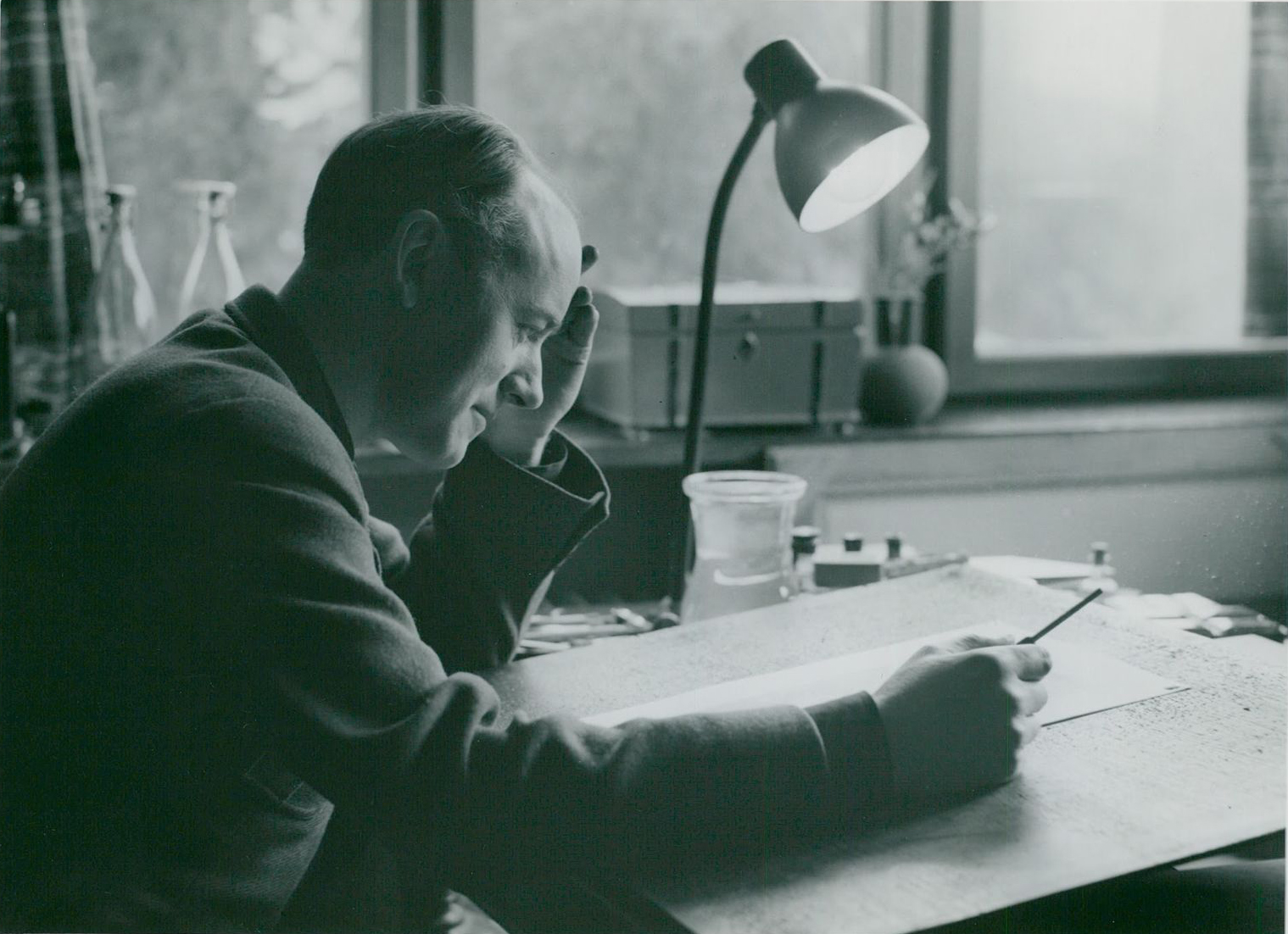 Baksidestext: "Norelius, Einar 1939 Konstnär. Ängby." Till synes samtida med ett fotografi publicerat i Svenska Dagbladet 1939-02-08 sid 3.